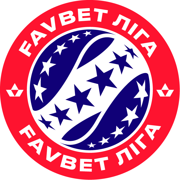 Офіційна емблема Favbet Ліги